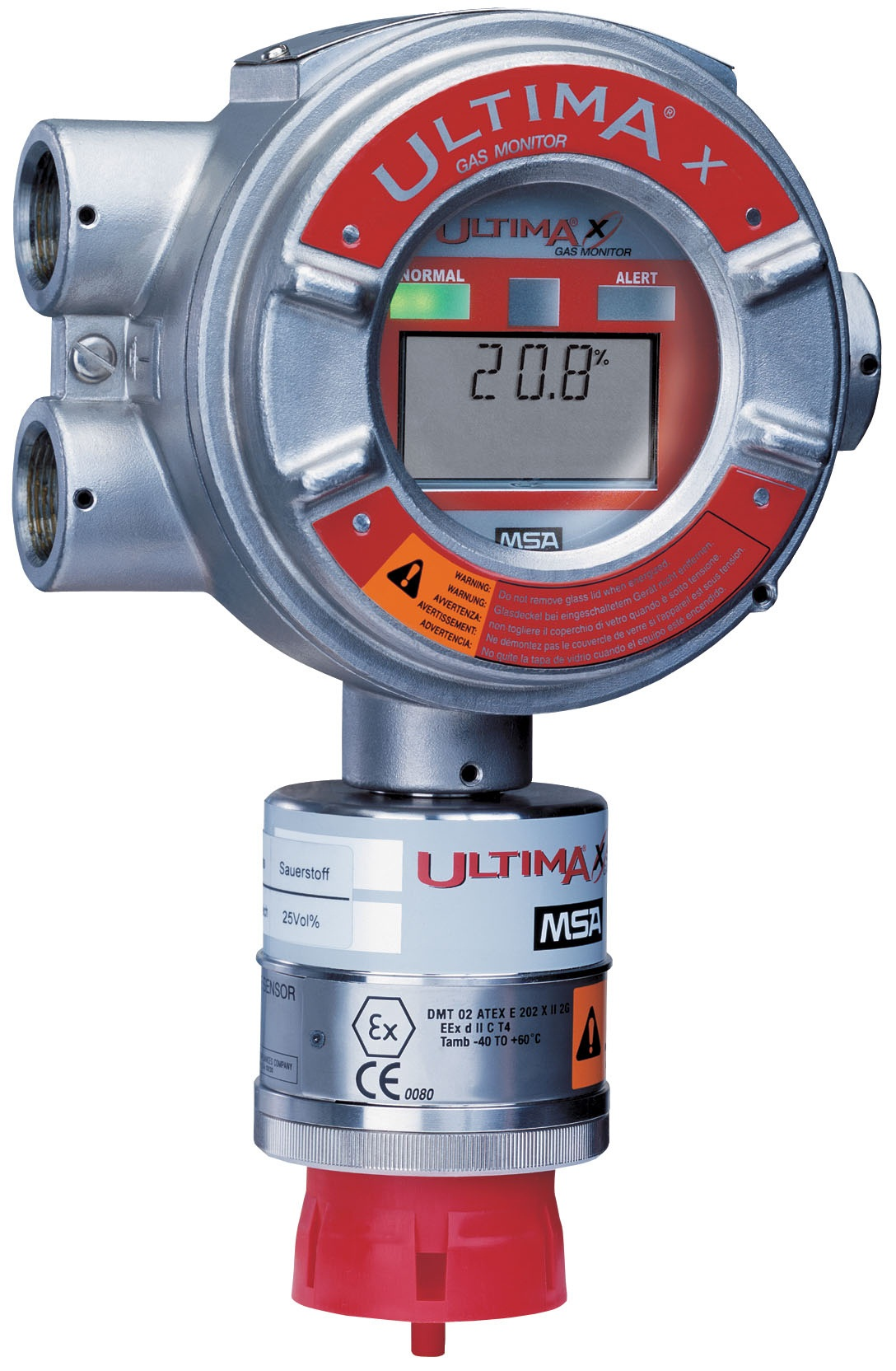 aktivr Gasdetektor UltimaXE